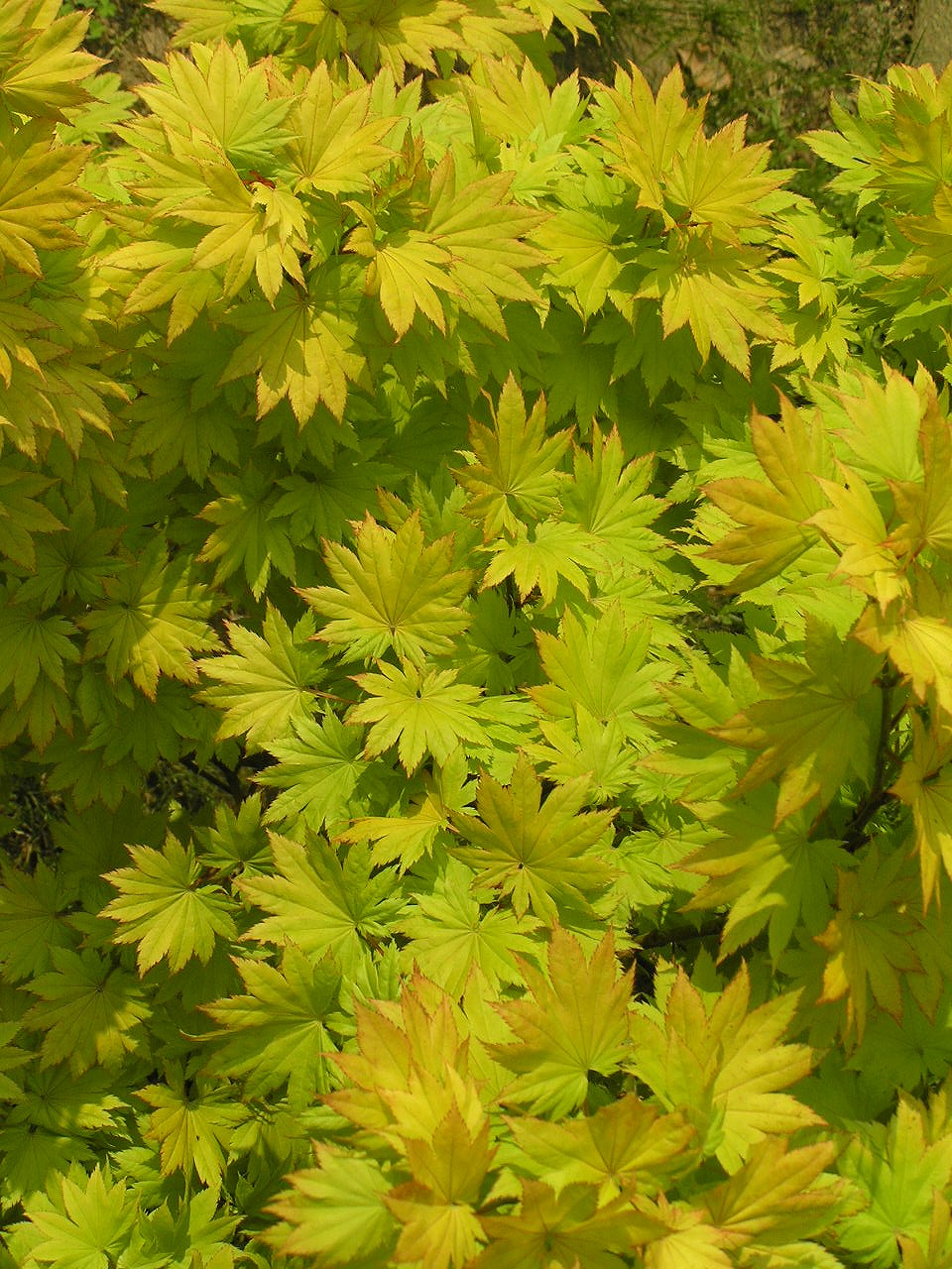 ハウチワカエデ